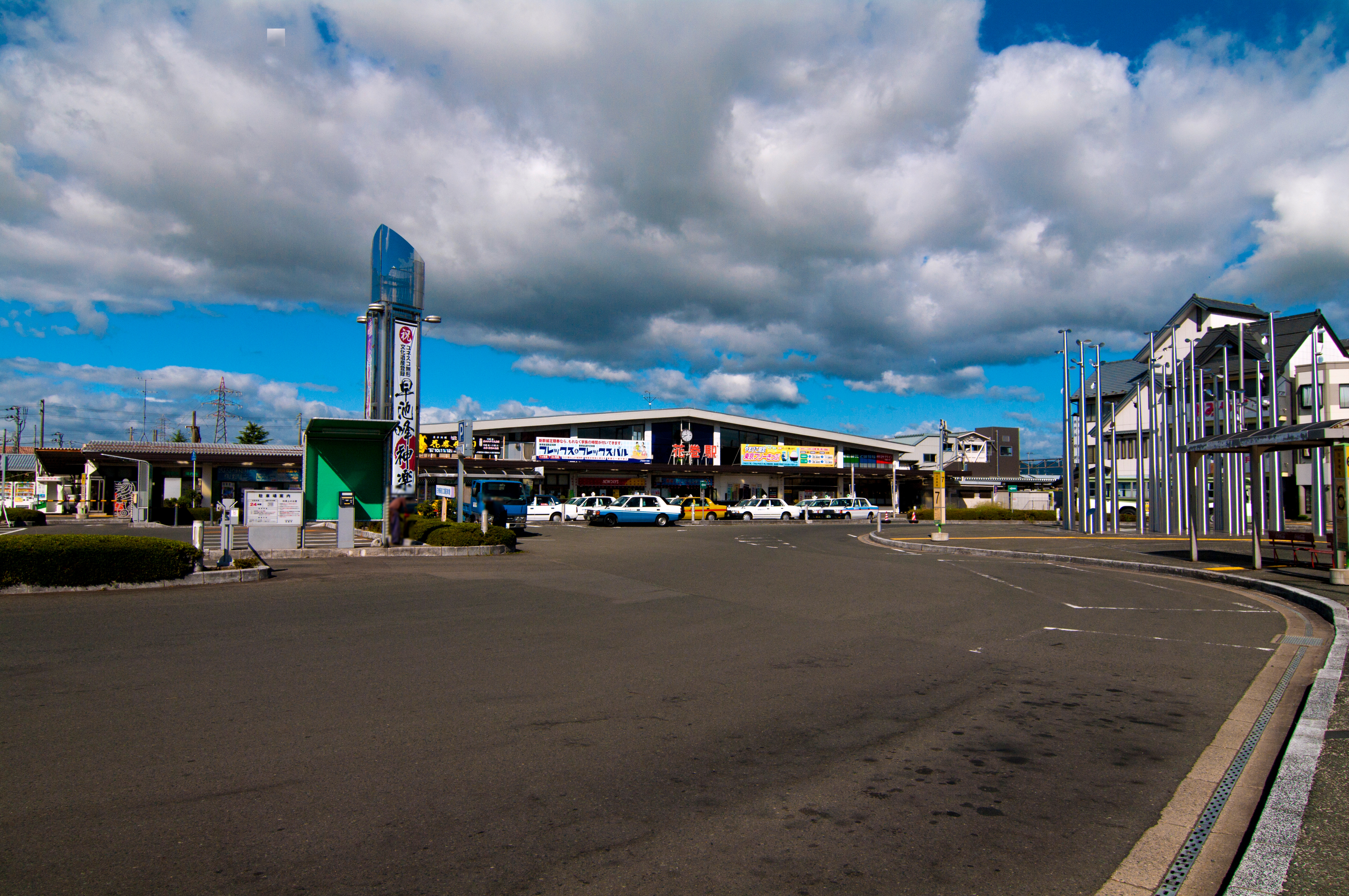 東日本旅客鉄道東北本線花巻駅